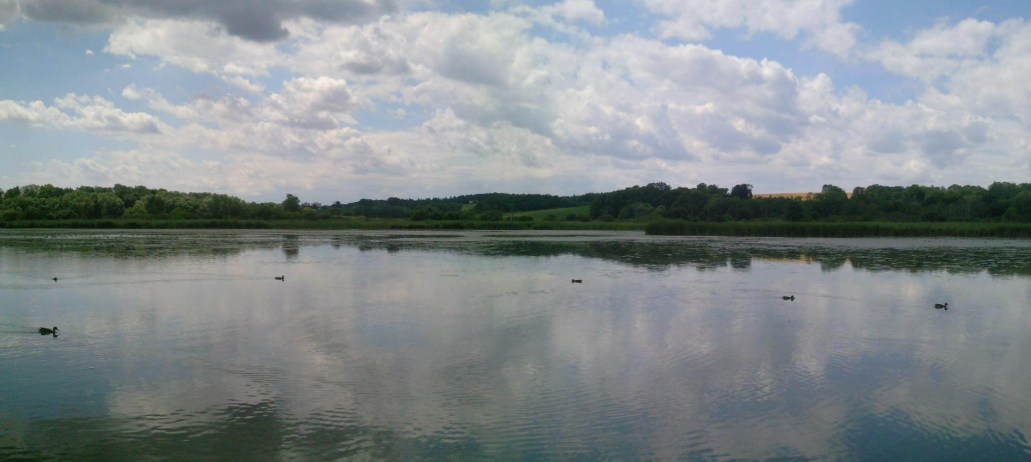 Panoramatický pohled na rybník Štěpán v přírodní rezervaci Štěpán